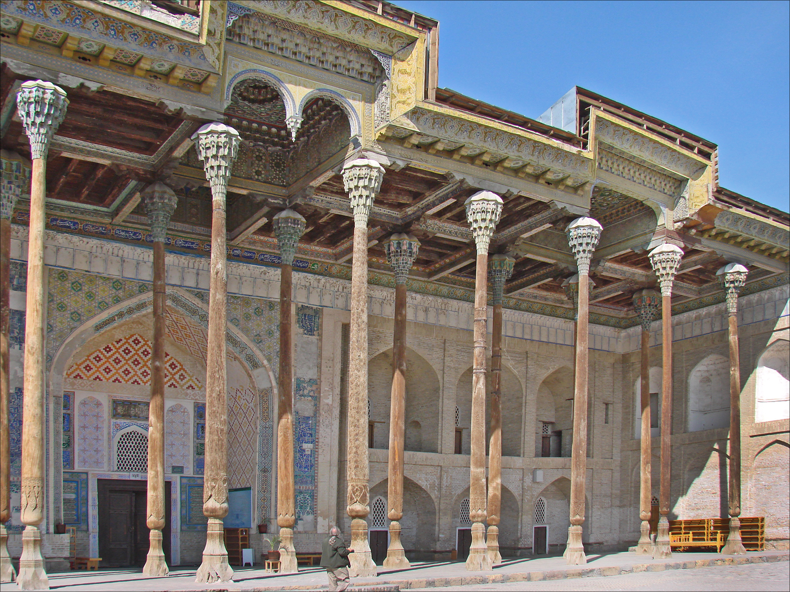 La mosquée Bolo-Khaouz (ou Bolo-Haouz) est une mosquée du vendredi. La partie intérieure date de 1712, par contre l'Iwan (l'avant-toit pour l'été) date du début du XX ème siècle; Elle fait partie d'un ensemble architectural comprenant un bassin (Khaouz), un minaret et une mosquée. Le tout est face à la citadelle de l'Ark. Photo Annie Dalbéra